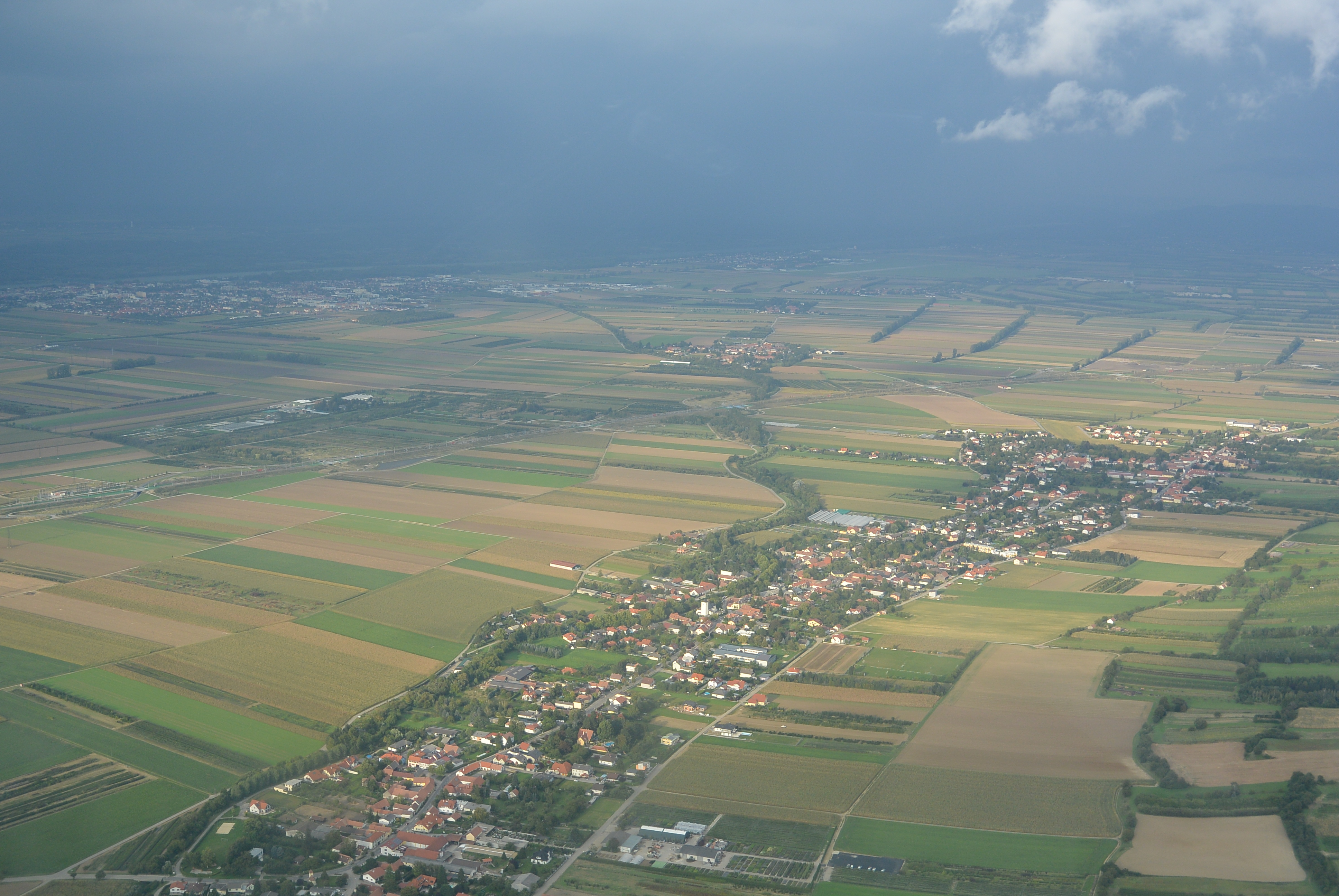 Luftfoto Henzing - Sieghartskirchen 2013